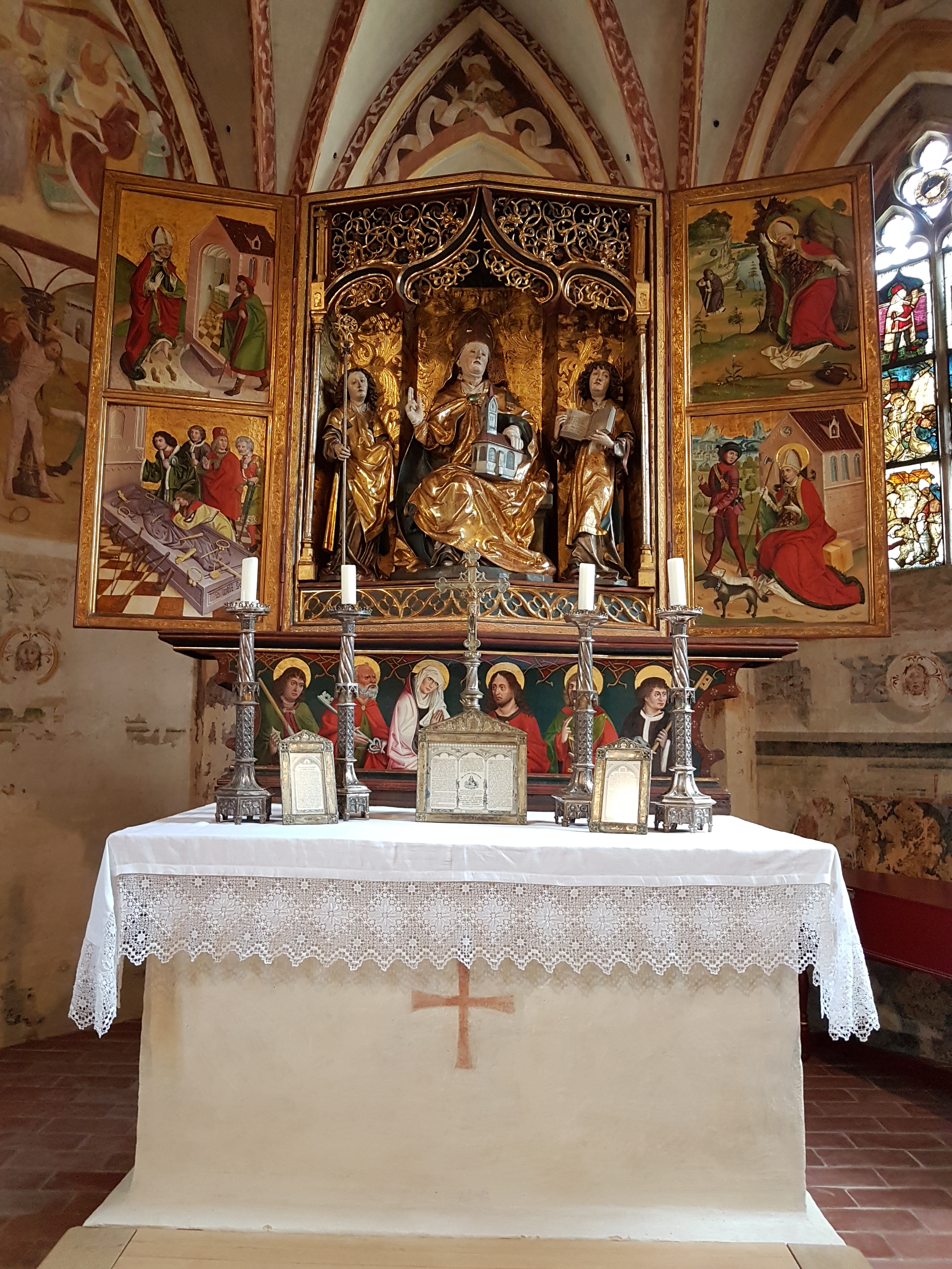 München-Pipping, St. Wolfgang, Hochaltar.